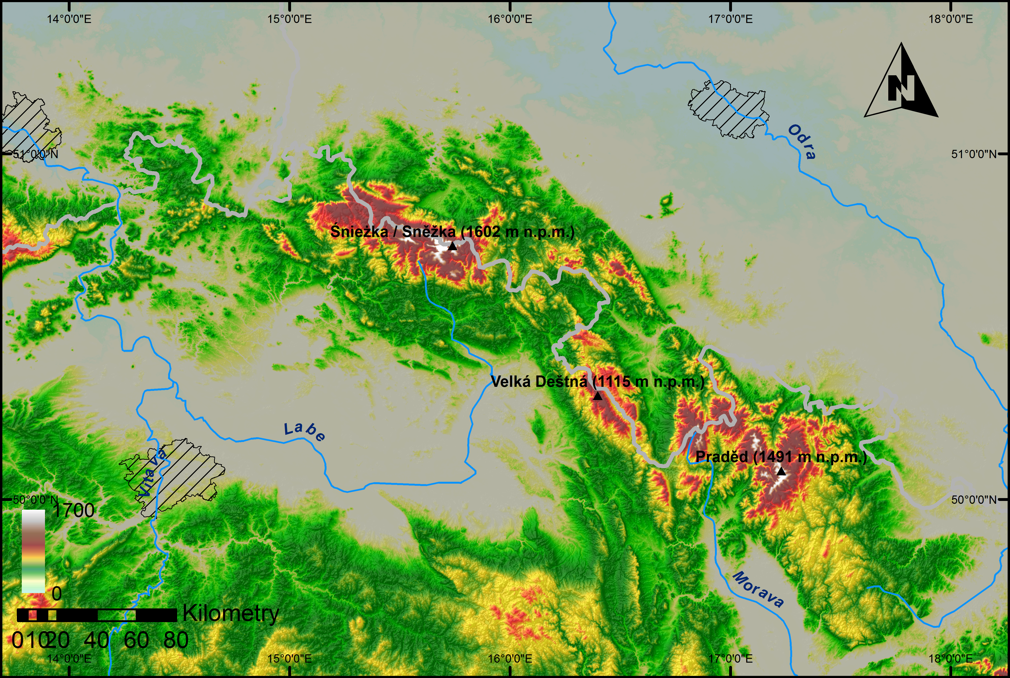 Sudety; miasta (Wrocław, Praha i Dresden) = zakreskowane pola, granice państwowe = jasnoszare linie